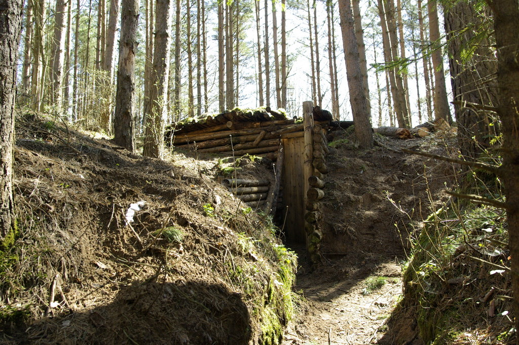 Mummassaares taastatud Rebase pataljoni kaevikud Sinimägede lahingu ajast.